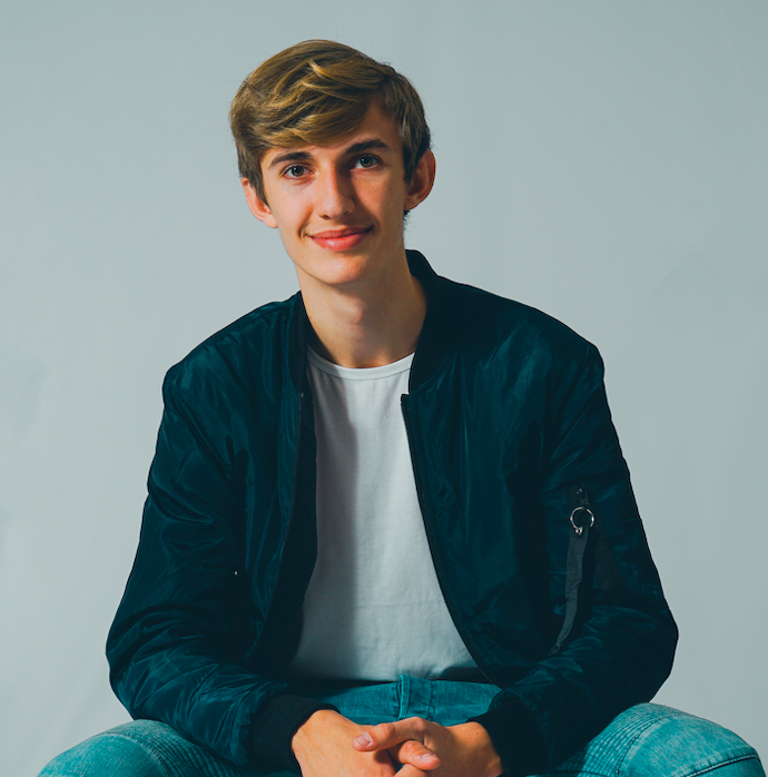 Patrik ve studiu.